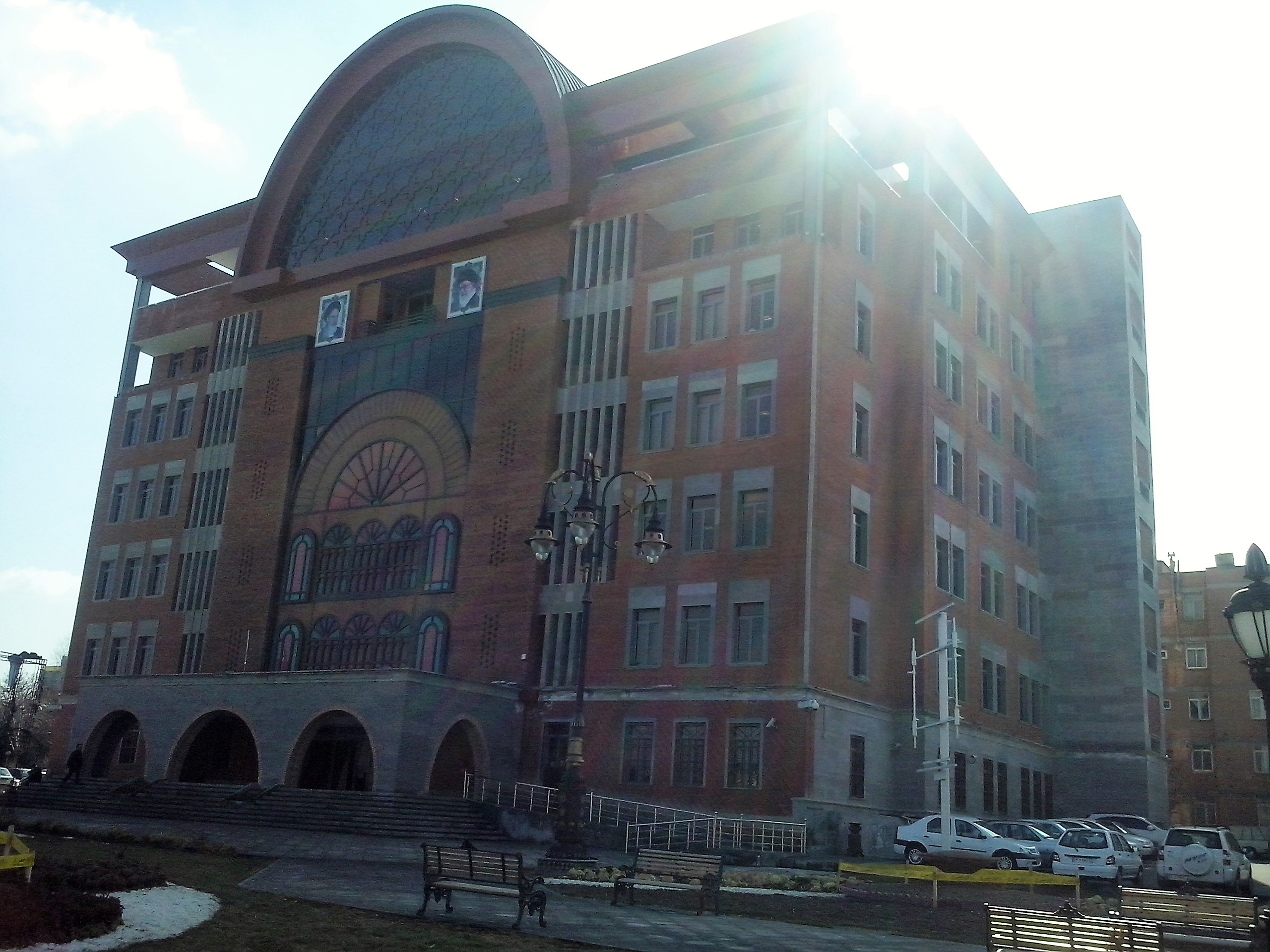 ساختمان جدید شهرداری تبریز در چهارراه ابوریحان.